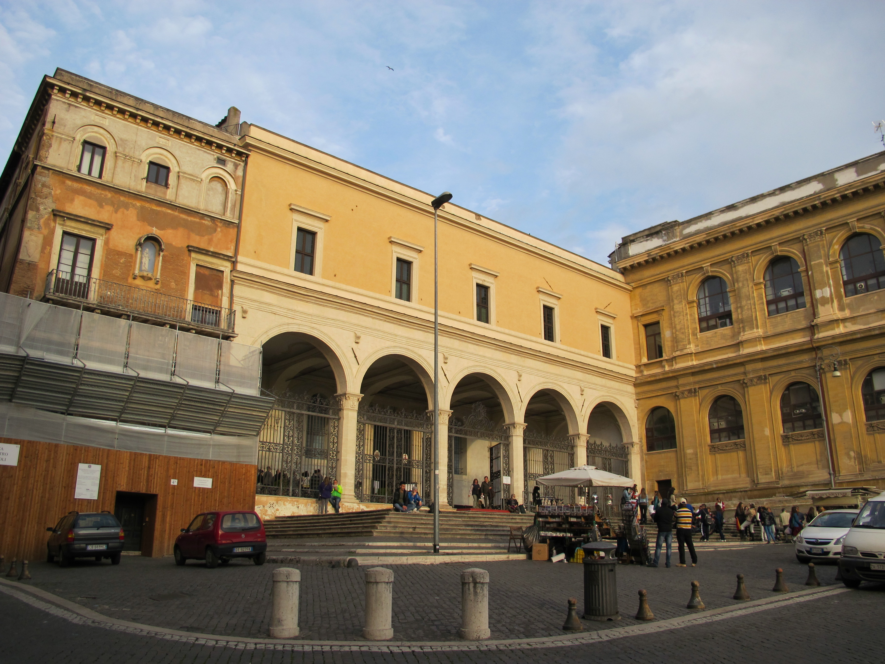 San pietro in vincoli, esterno